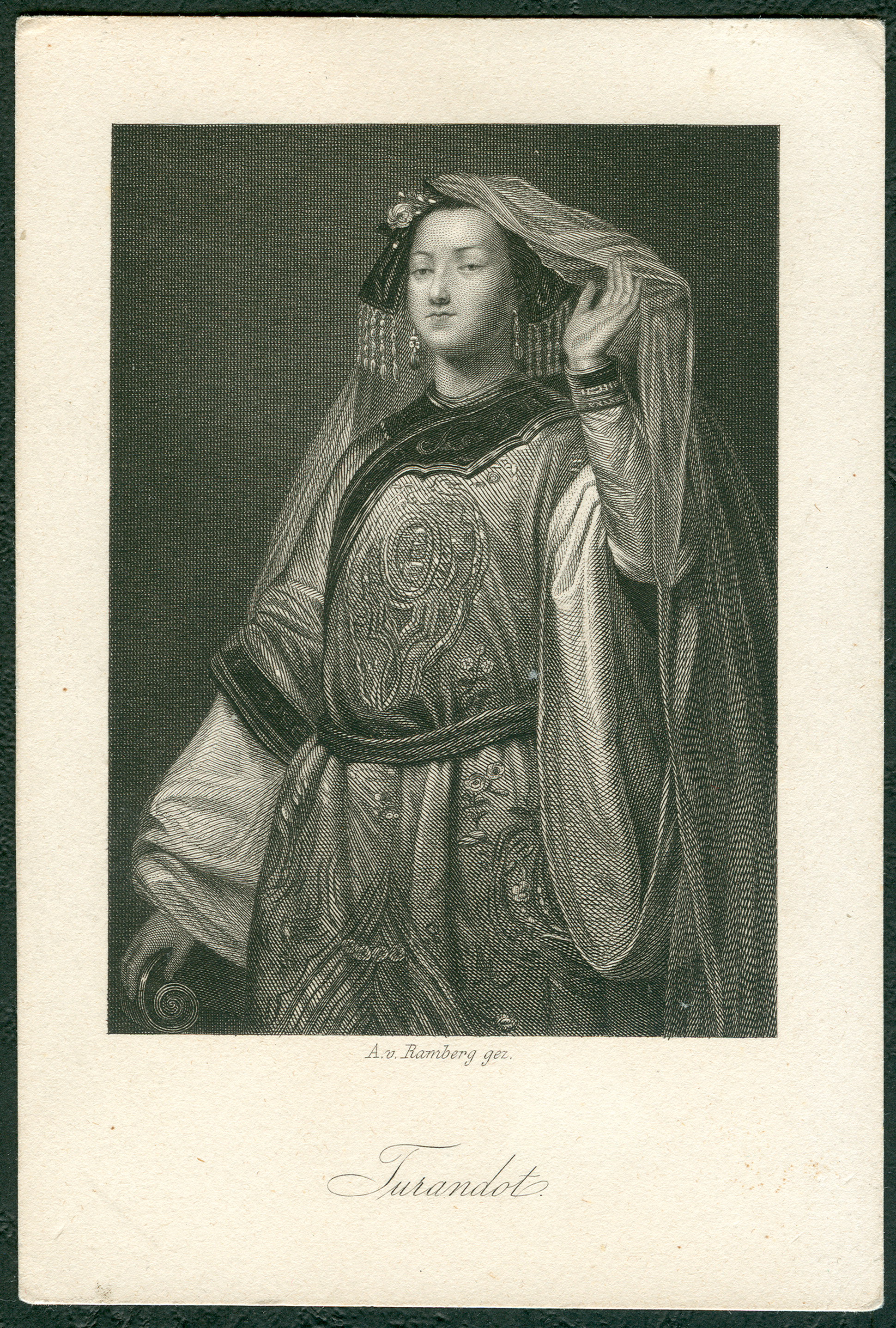 Turandot, Prinzessin von China, als Stahlstich gestochen von Georges François Louis Jaquemot um 1859 nach einer Zeichnung von Arthur von Ramberg; das untertitelte Blatt hat die Maße 8 cm x 11,6 cm und hat auf der Rückseite keine weiteren Angaben. Es gehört zu einer Serie, möglicherweise als frühes Sammelbild, die als Schiller-Galerie von Friedrich Pecht und von Ramberg bekannt geworden ist.